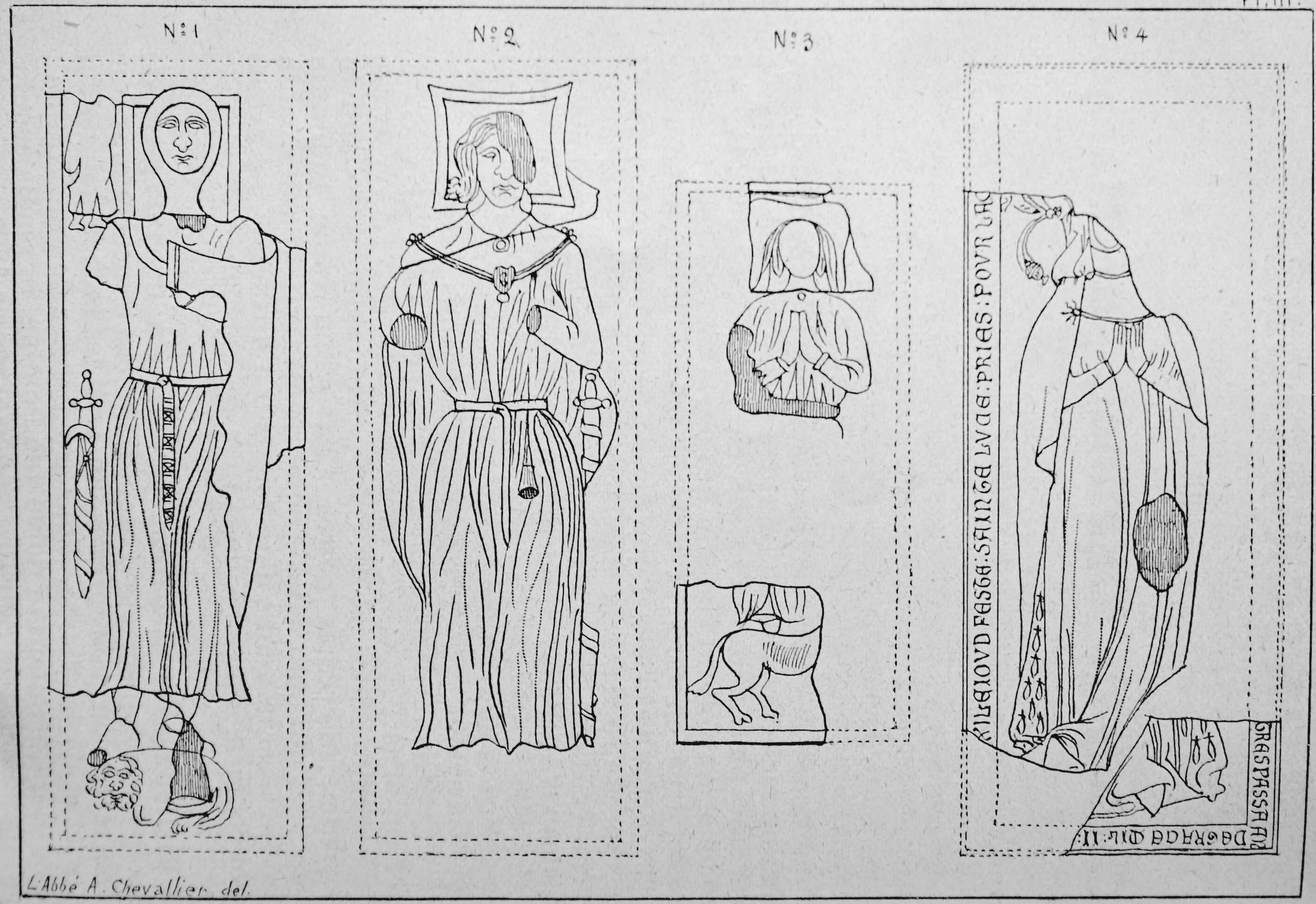 extrait de l'almanach matot-braine.